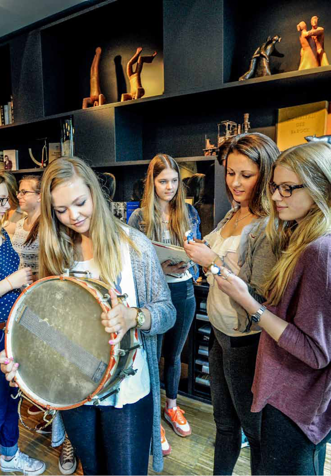 Schüler entdecken den "Komos Grass"